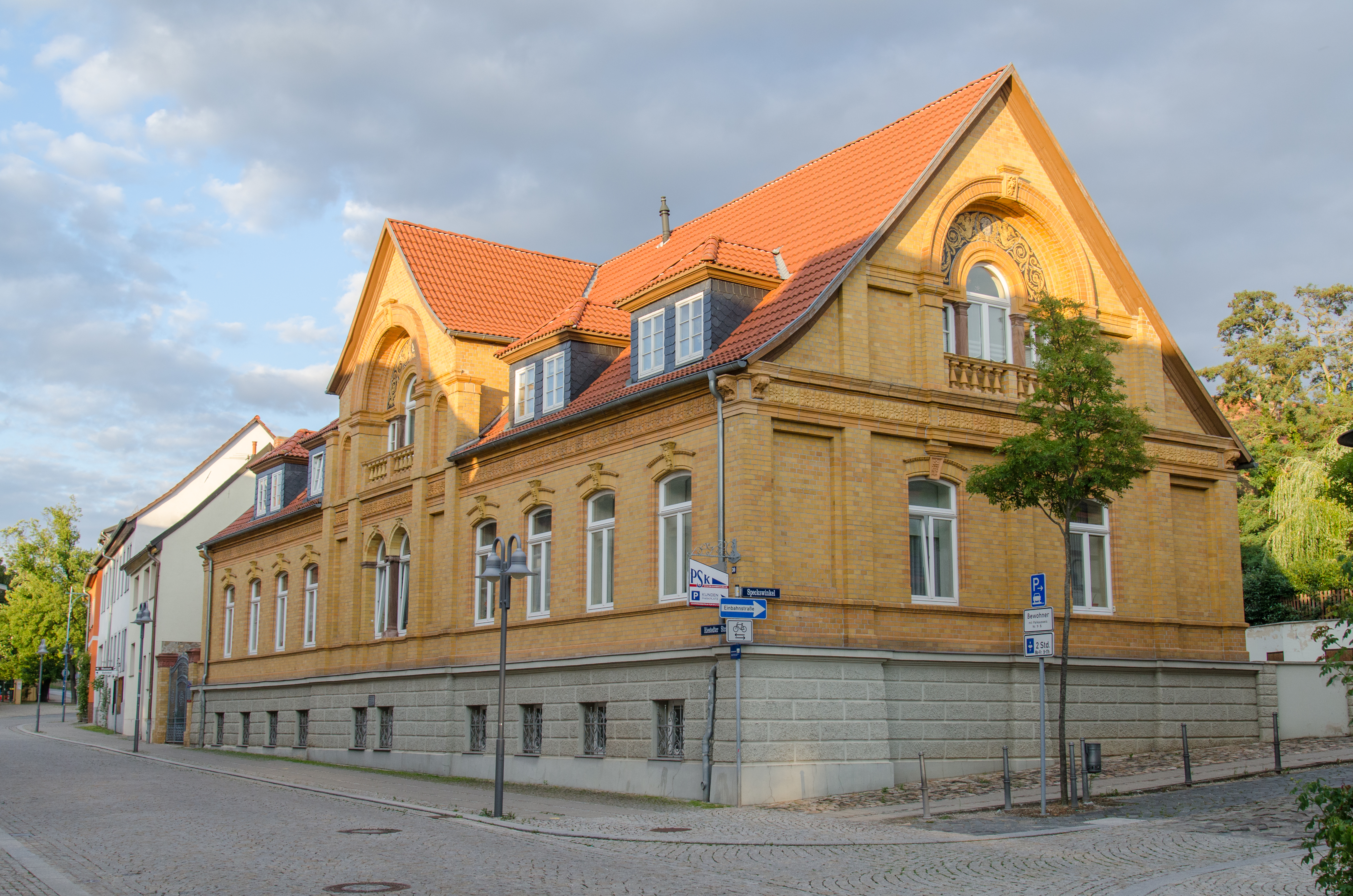 Sangerhausen, Riestedter Straße 30